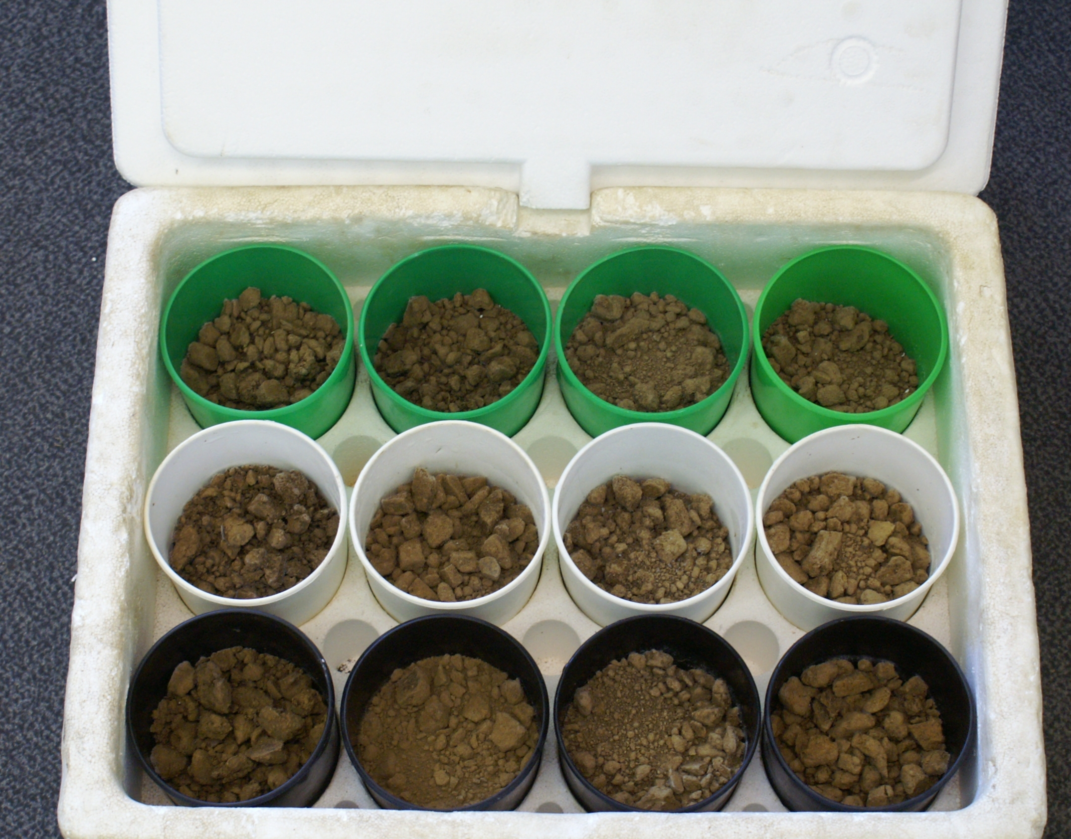 Nitrat-Bodenproben in ordnungsgemäßer Isolierbox